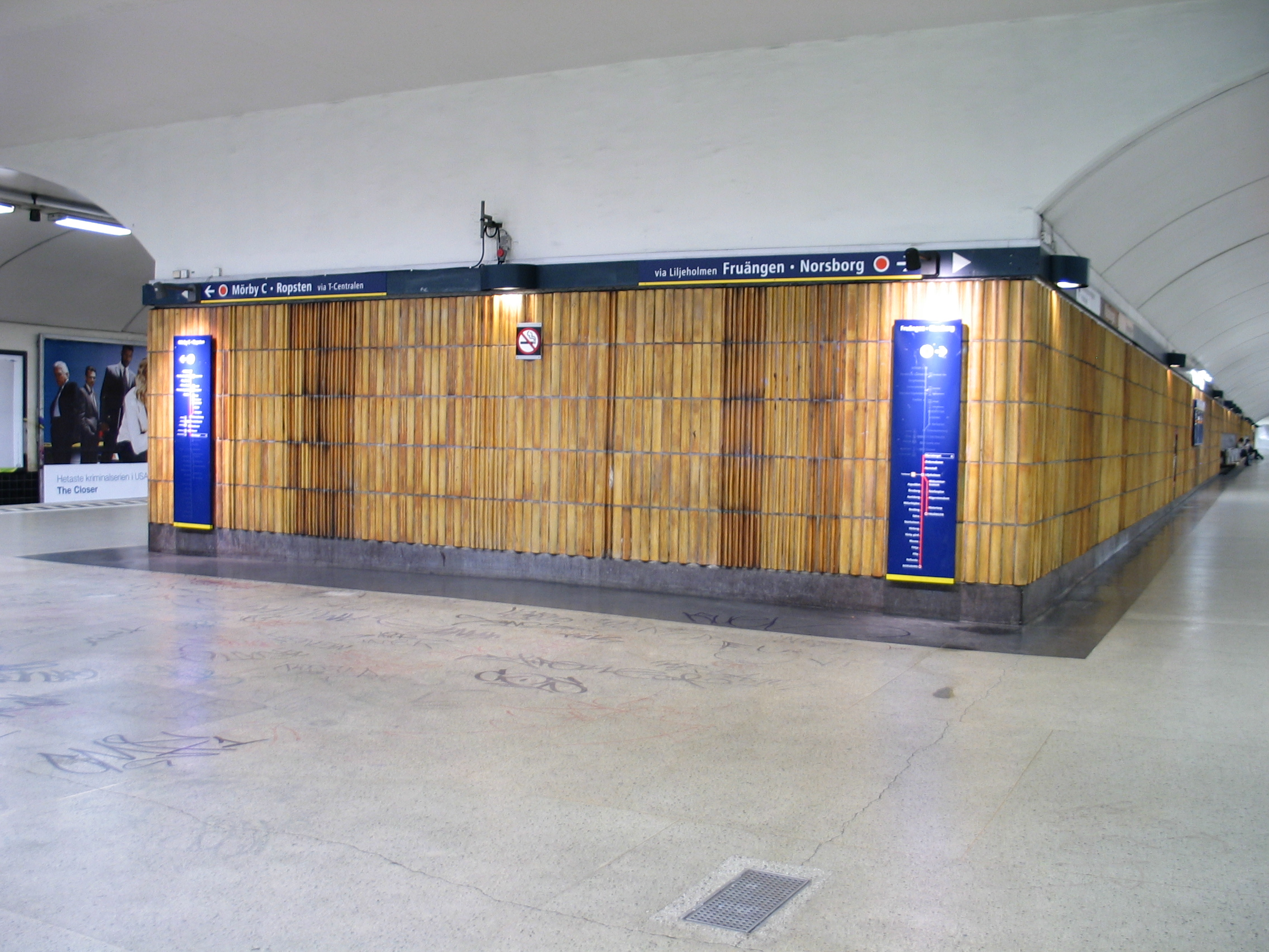 Mariatorget, a metro station in Stockholm, Sweden.